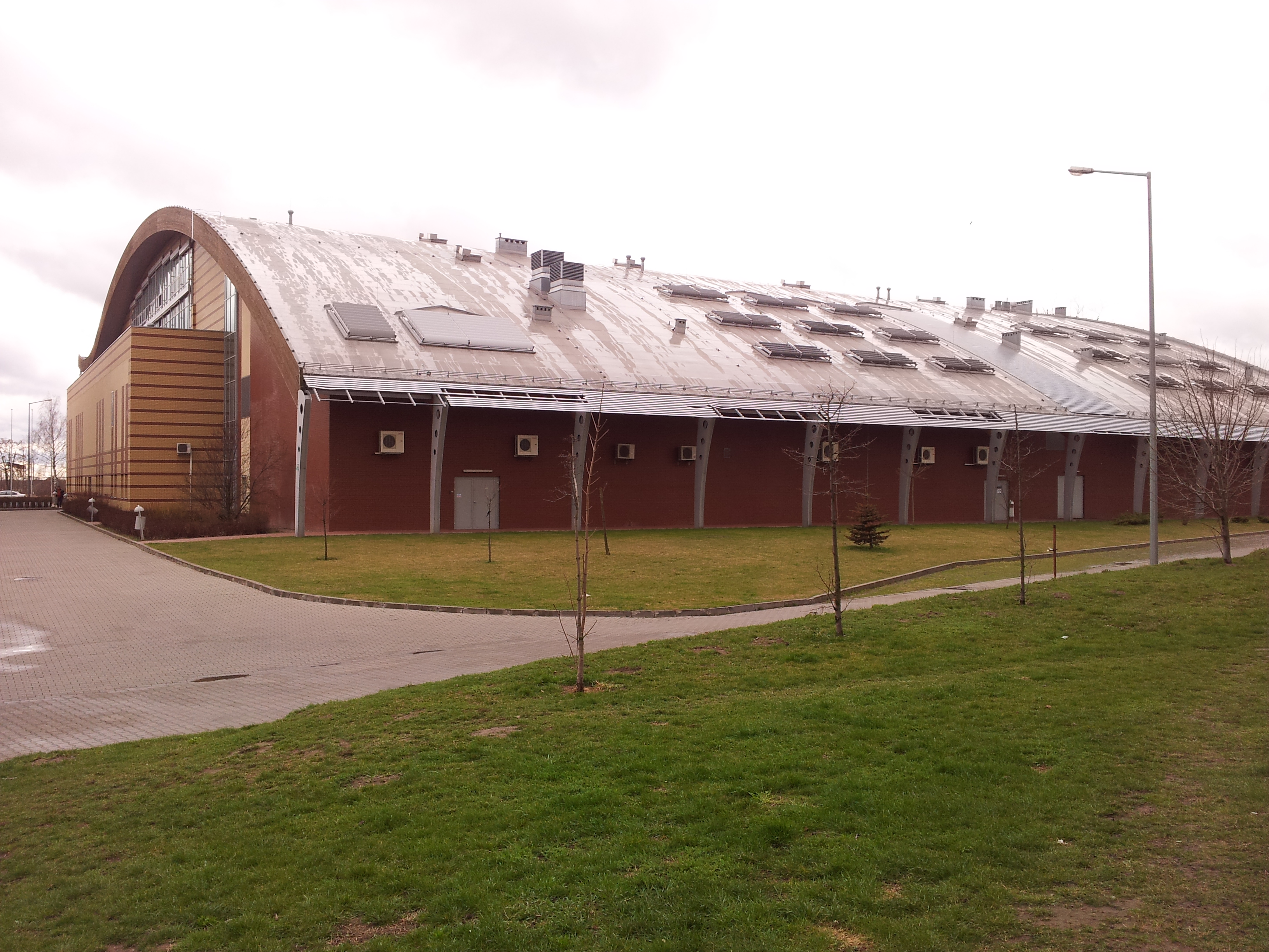 Tył budynku Centrum Sportowo-Biznesowego w Elblągu.